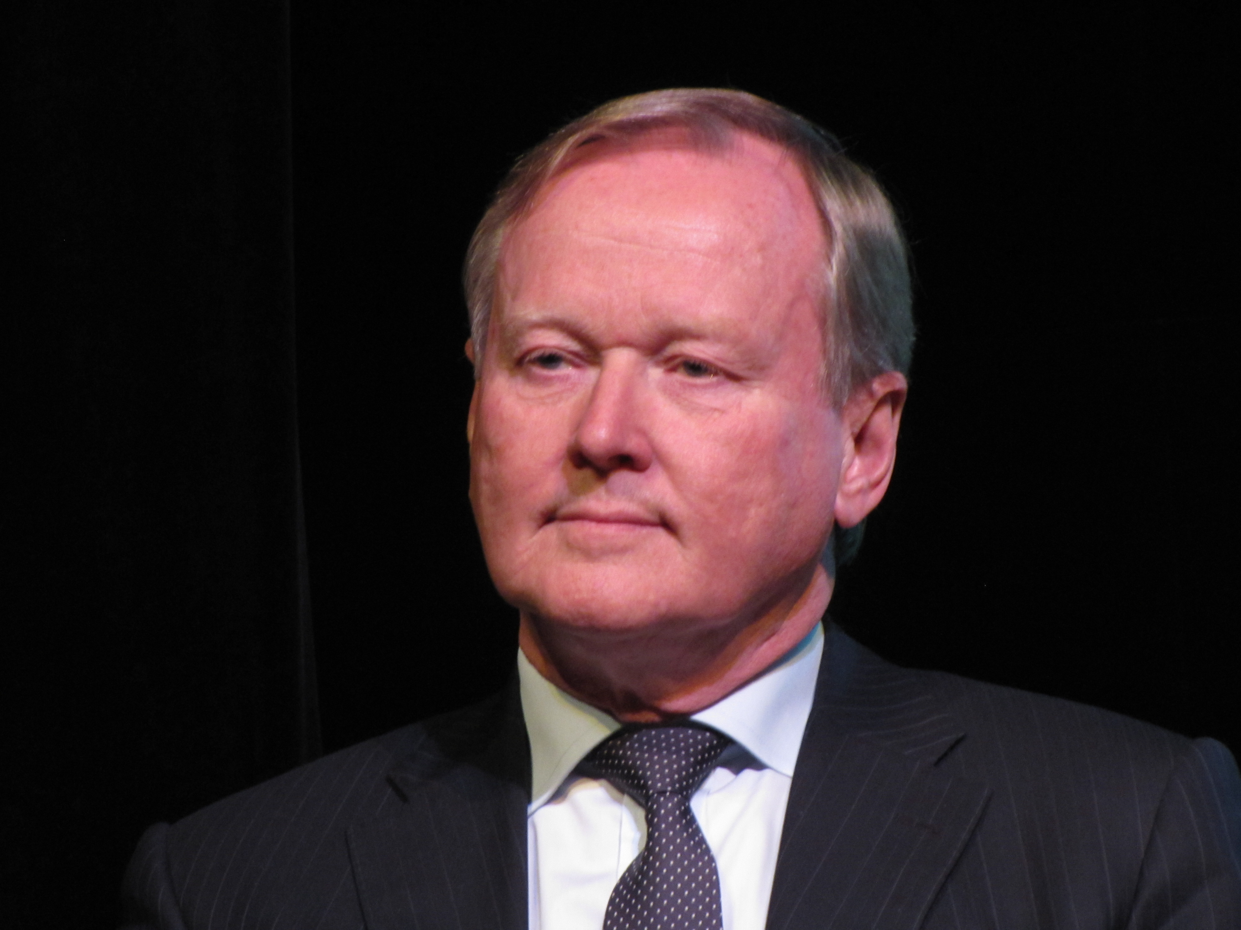 Leif Östling, några minuter innan han tilldelas Gustaf Dalén-medaljen 2012.